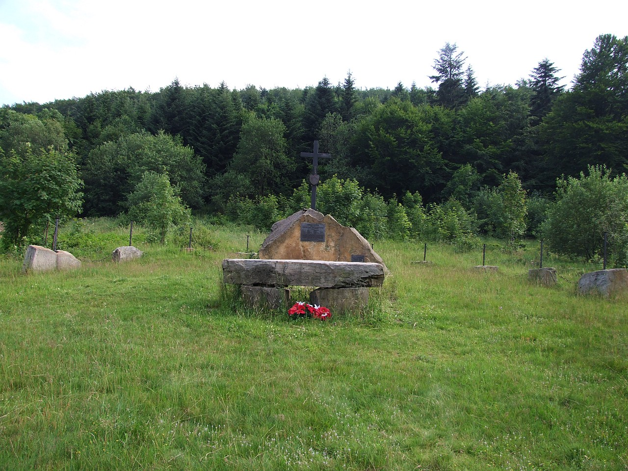 Sucha Przełęcz (Beskid Makowski). Ołtarz polowy odtworzony na pamiątkę mszy partyznackich z II wojny światowej